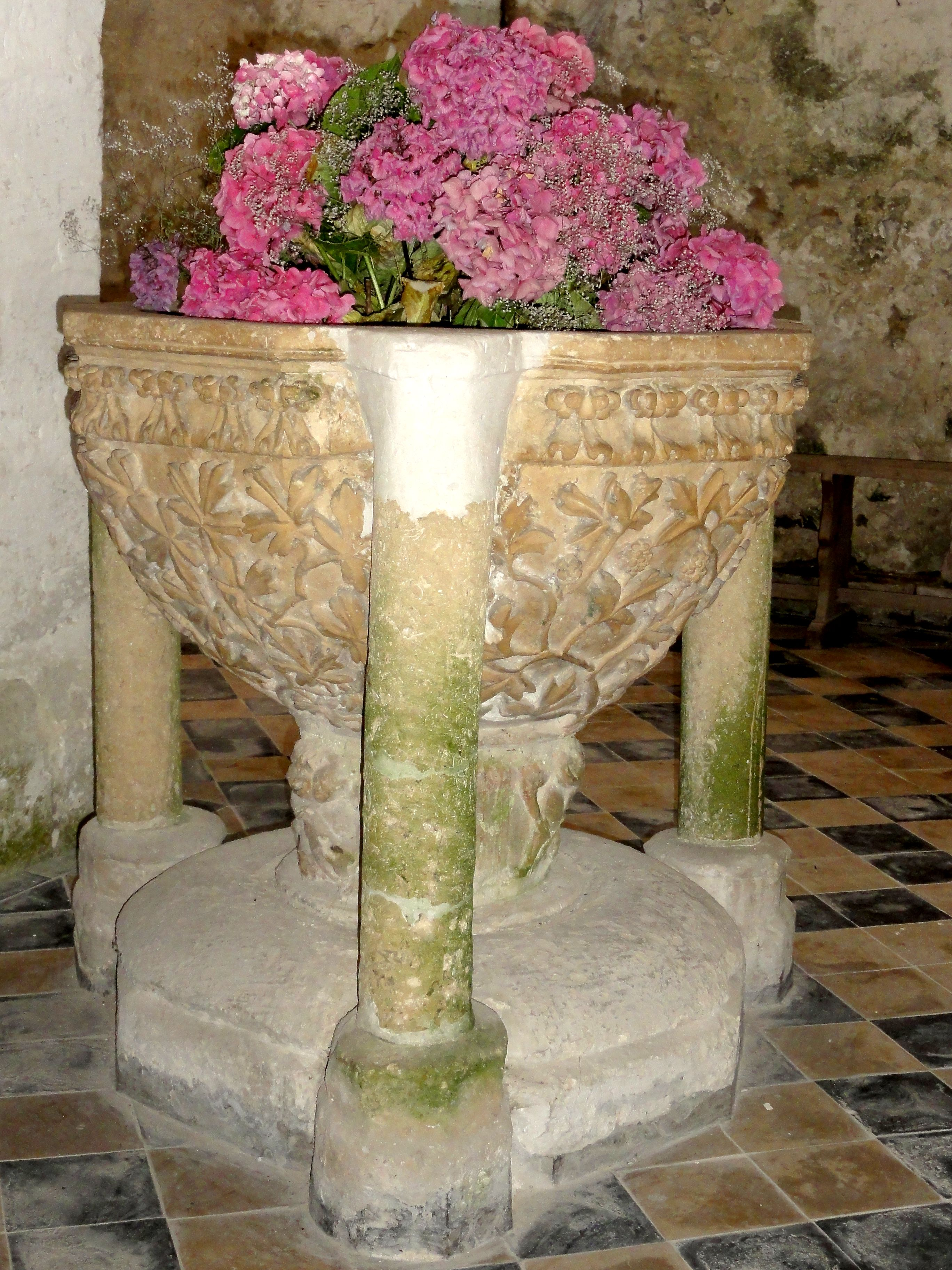 Fonts baptismaux.